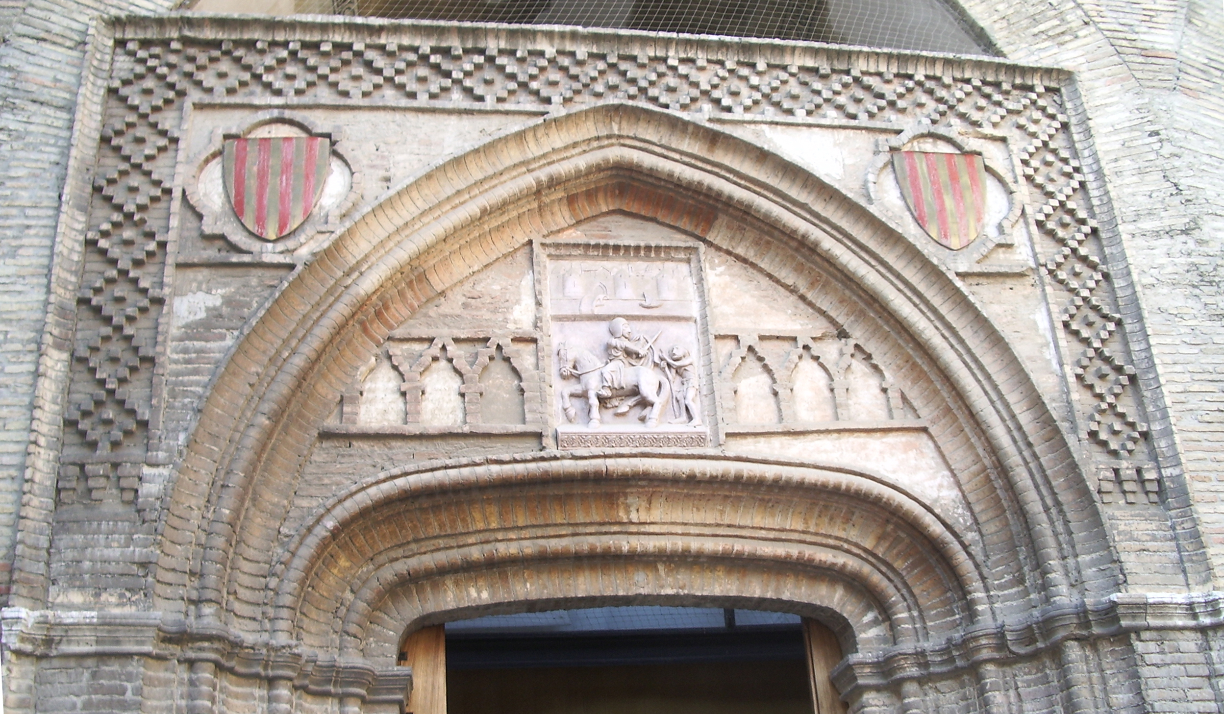 Arco_iglesia_san_martin